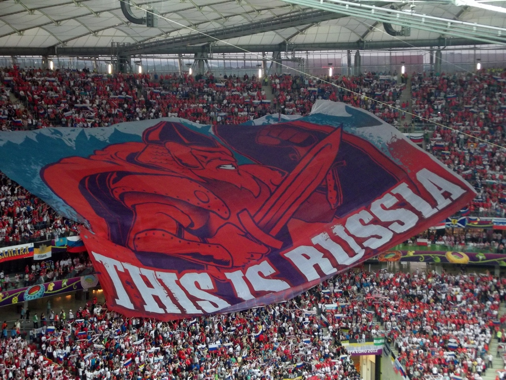 Zdjęcie zrobione w piątym dniu UEFA Euro 2012 w Warszawie, marszu rosyjskich kibiców i meczu Polska-Rosja.